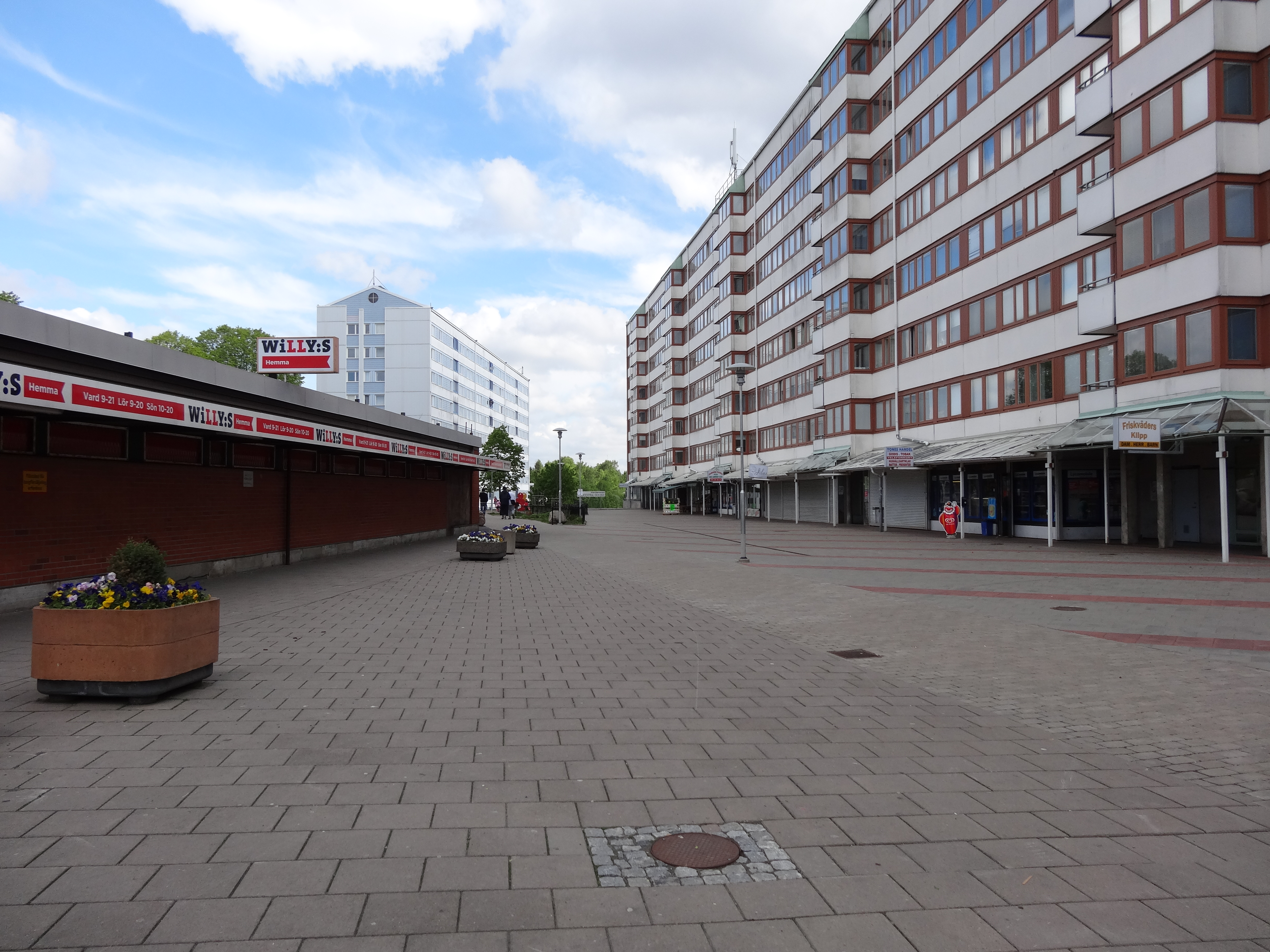 Friskväderstorget i stadsdelen Biskopsgården i Göteborg.